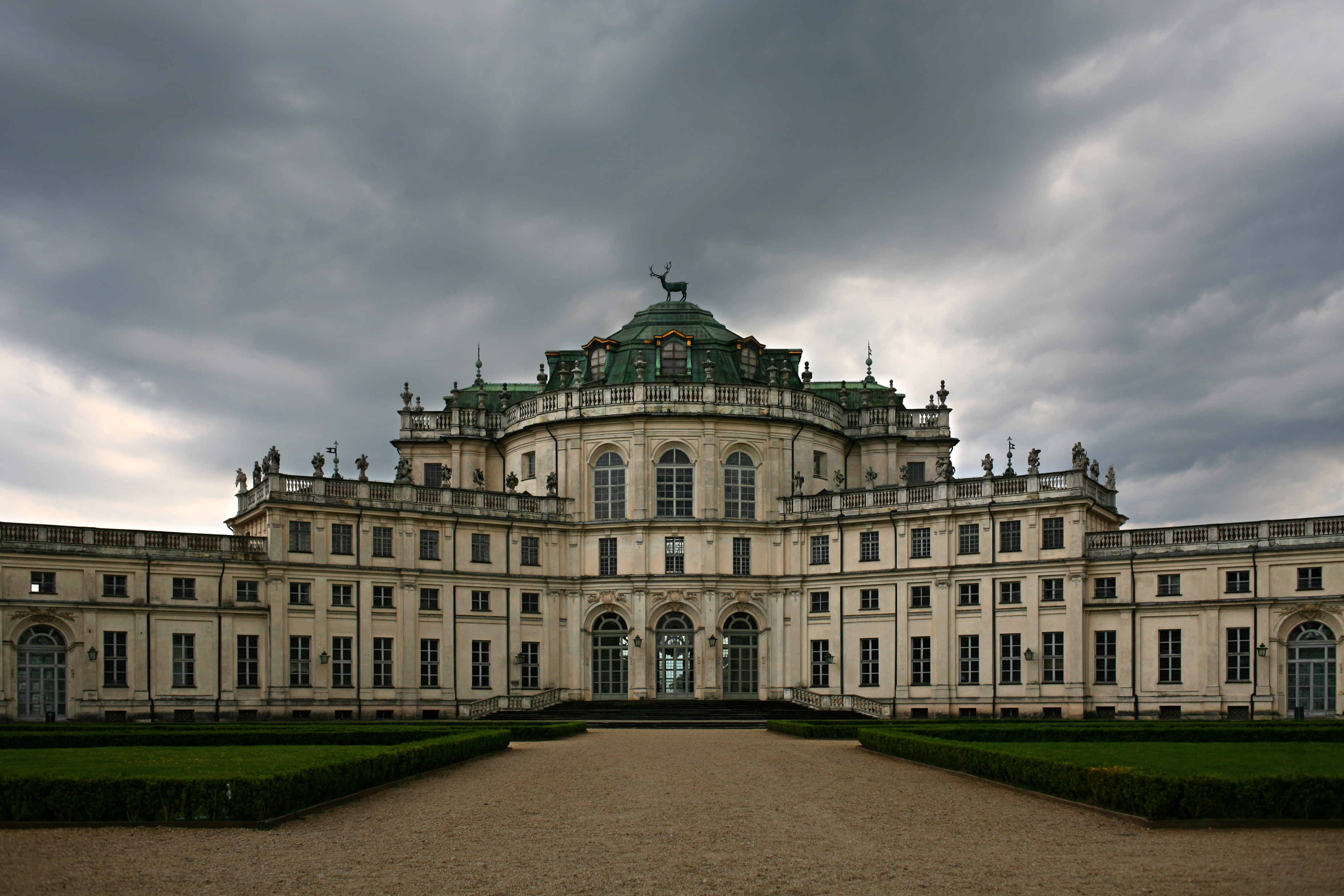 La palazzina di caccia di Stupinigi (Filippo Juvarra, 1729-1733) vista della facciata